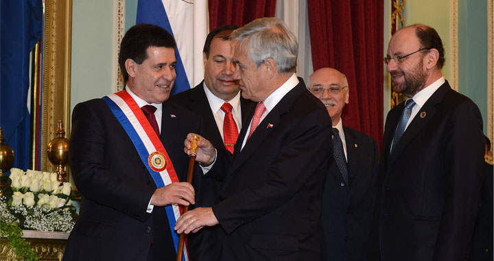 Sebastián Piñera, presidente de Chile, saluda al nuevo presidente paraguayo Horacio Cartes. Detrás de ambos, observa el vicepresidente Juan Afara.